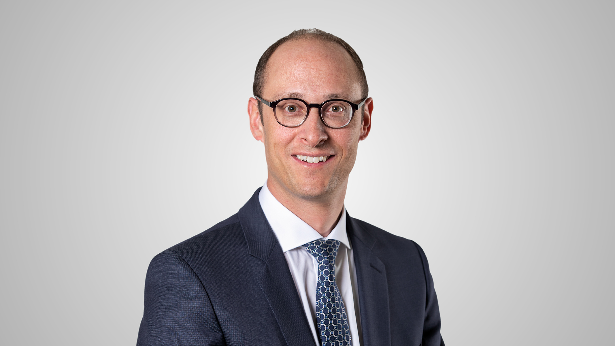 Bild im Besitz NR Martin Candinas